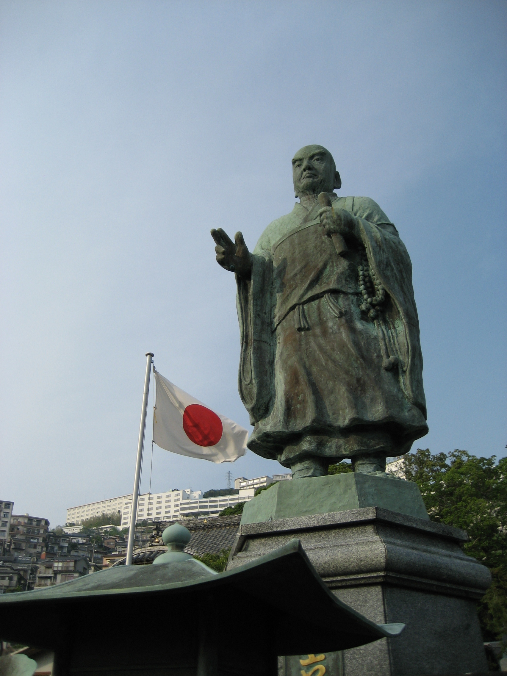 Shinto temple in Nagasaki, Japan.